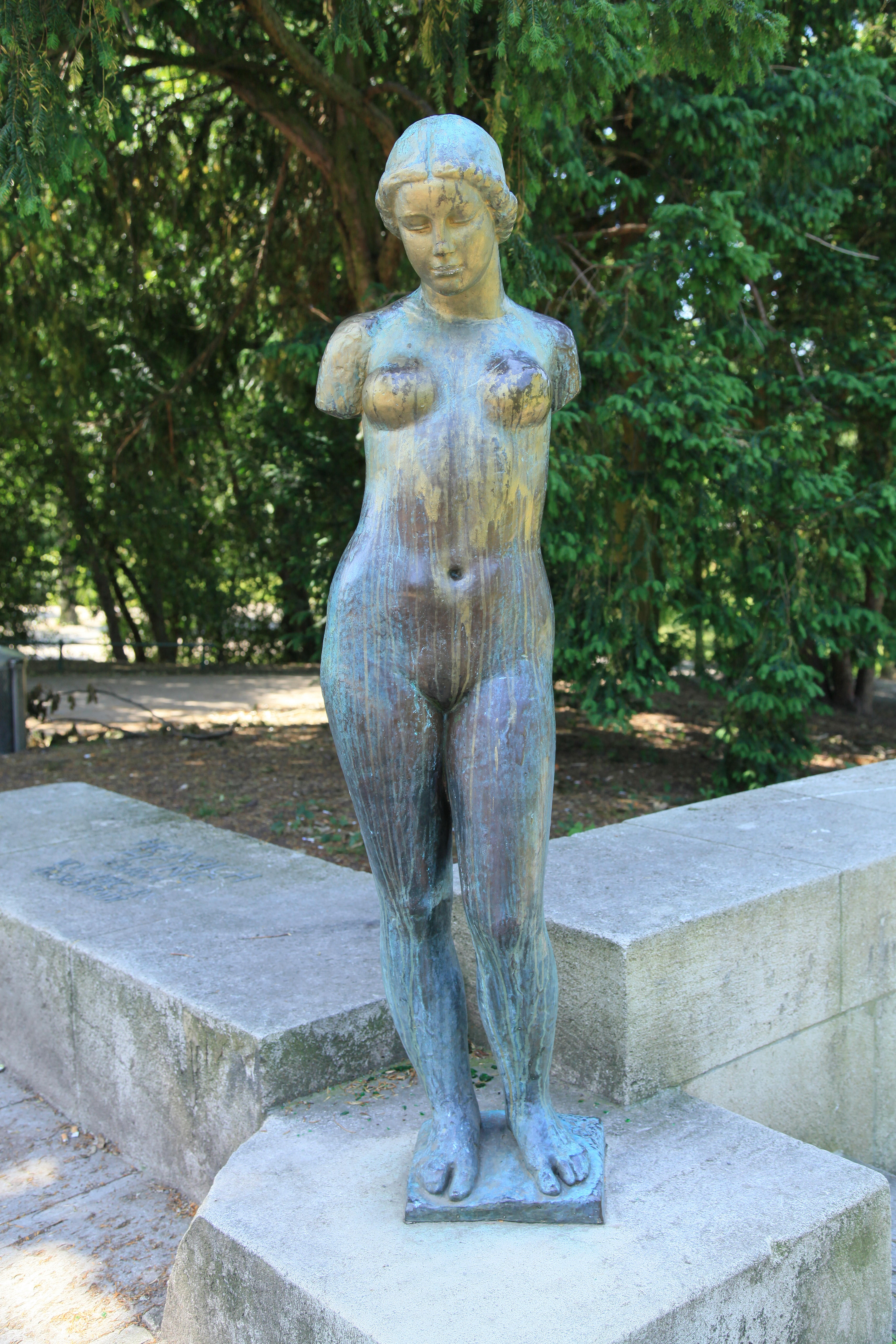 "Harmonie" von Aristide Maillol, Hofgarten in Düsseldorf